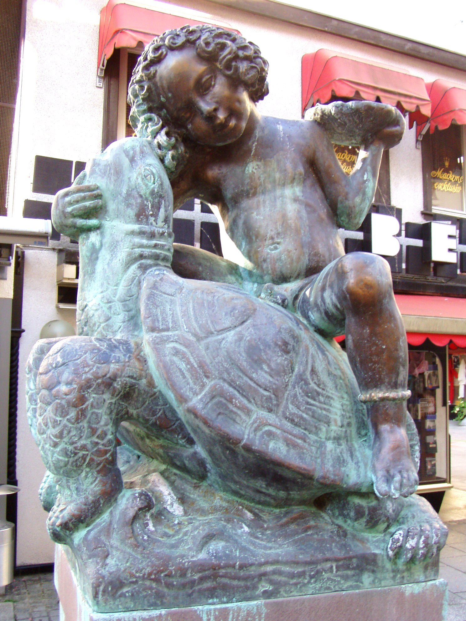 „Taschner-Brunnen“ (Fountain) in Bad Kissingen; Bronzefiguren von Ignatius Taschner (1871-1913); Copy (1993) of the original fountain in Poznań, Poland